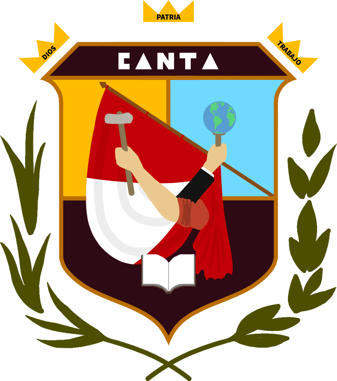 Canta, Lima